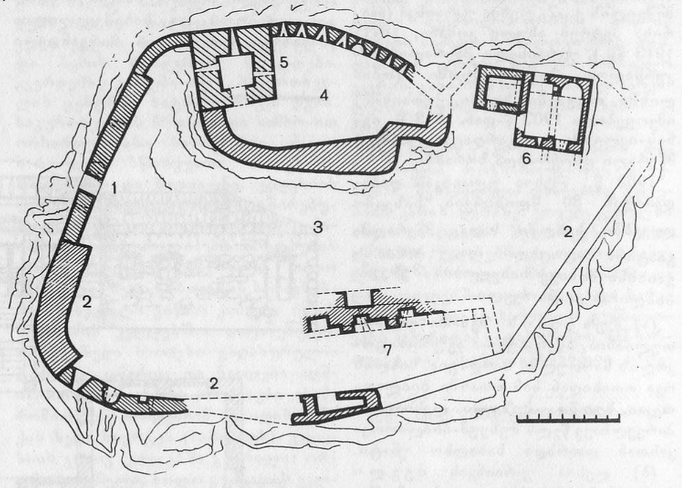 სურამის ციხის გეგმა